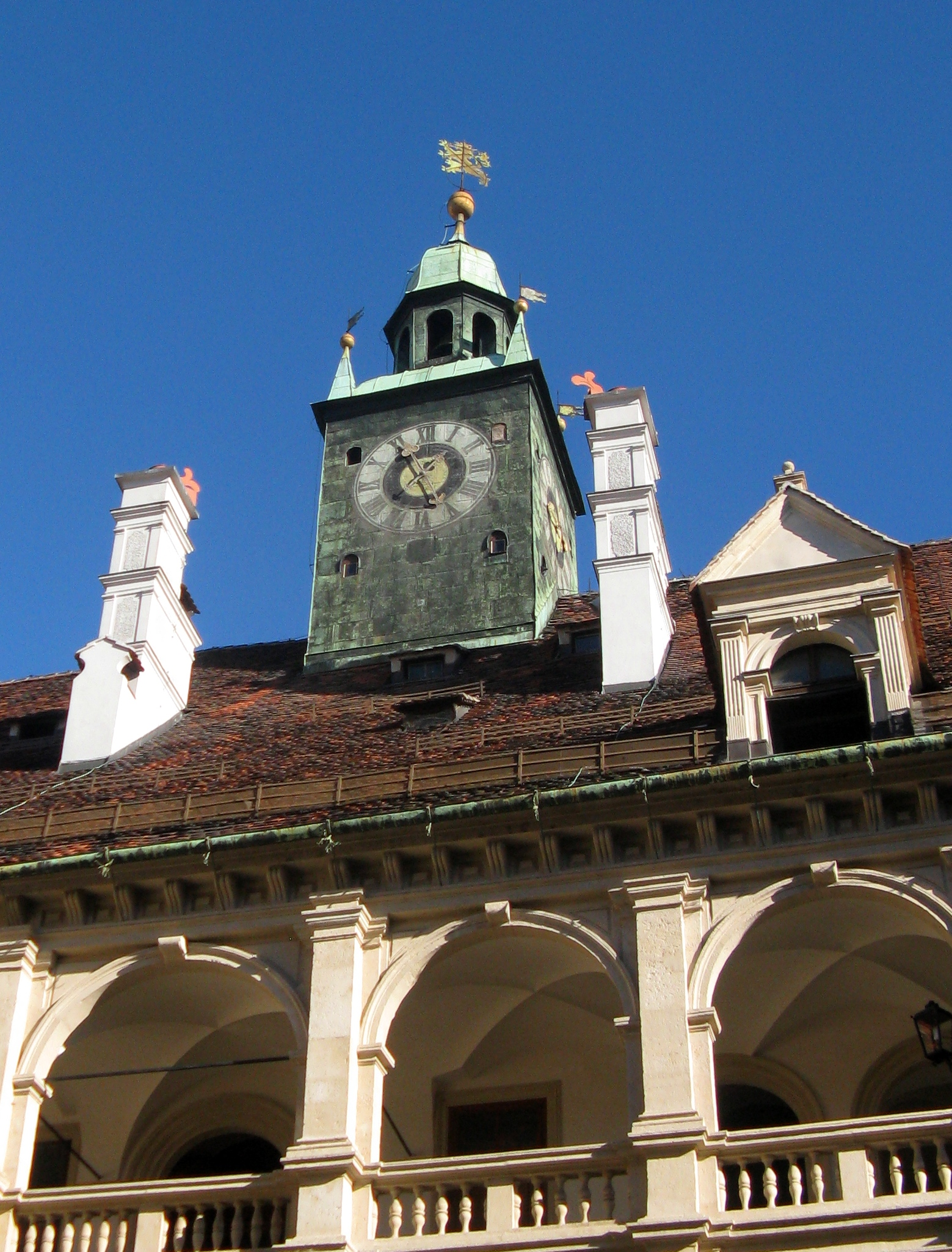 Dachreiter des Grazer Landhauses